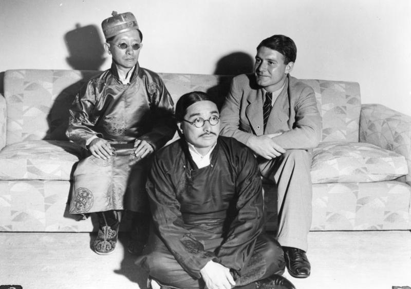 Tibetexpedition, Beim Maharadscha Gangtok, Dr. Schäfer mit Maharadscha [Maharaja] und Privatsekretär [Von links nach rechts: Chogyal / Maharadscha von Sikkim, Privatsekretär: Rai Sahib Tschi (Tashi) Dadul, Schäfer] Abgebildete Personen: Schäfer, Ernst Dr.: SS-Sturmbannführer, Leiter des Sven-Hedin-Institutes, Deutschland (GND 123991420)